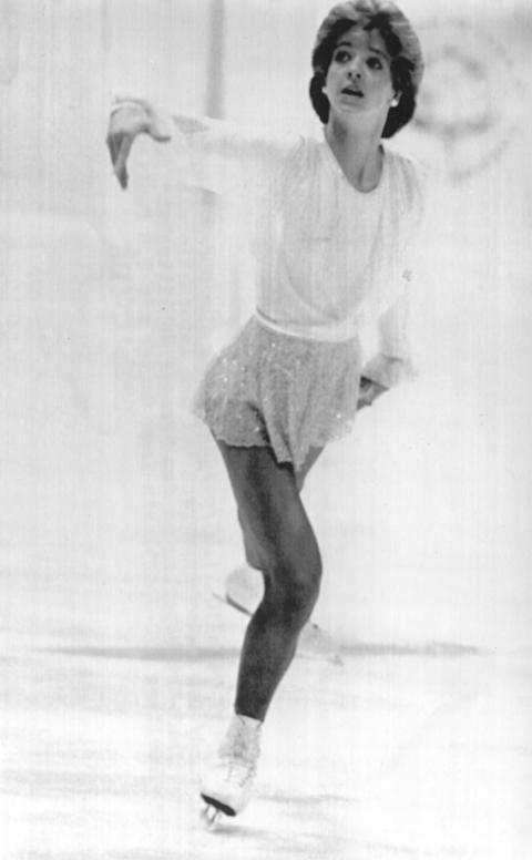 Inga Gauter ADN-ZB CTK-Tele-10.11.85-wo-CSSR: Sieg für DDR-Eislaufverband- Die Damenkonkurrenz bei den internationalen Eiskunstlauf-Wettbewerben um den "Prager Schlittschuh" gewann die Berliner TSC-Sportlerin Inga Gauter mit 2,8 Punkten.